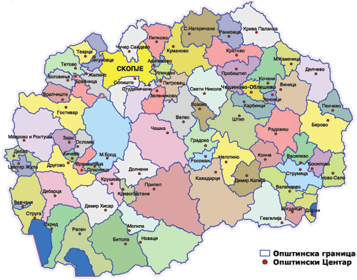 Communes in the Republic of MacedoniaКарта на општини во Република МакедонијаGminy w Macedonii